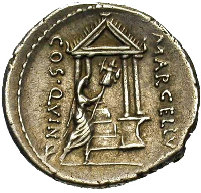 Монетарий Публий Корнелий Лентул Марцеллин. Выпуск в честь консула М. Клавдия Марцелла Денарий, серебро Дата чеканки: 50 г. до н. э.* Монетный двор: Рим вес: 4.03 г АВЕРС: Обнаженная голова консула М. Клавдия Марцелла вправо; сзади — фигура из трех ног, triscelis, спереди — MARCELLINVS, имя монетария. РЕВЕРС: Тетрастильный храм, перед которым фигура М. Клавдия Марцелла в тоге, под покрывалом, несущего трофей. По сторонам: MARCELLVS COS. QVINQ. (Marcellus consul quinquies)